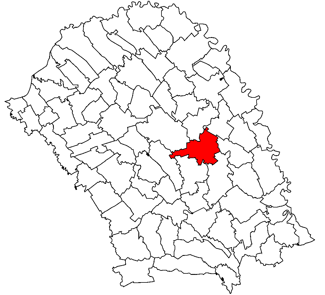 Categorie:Hărţi ale judeţului Botoşani